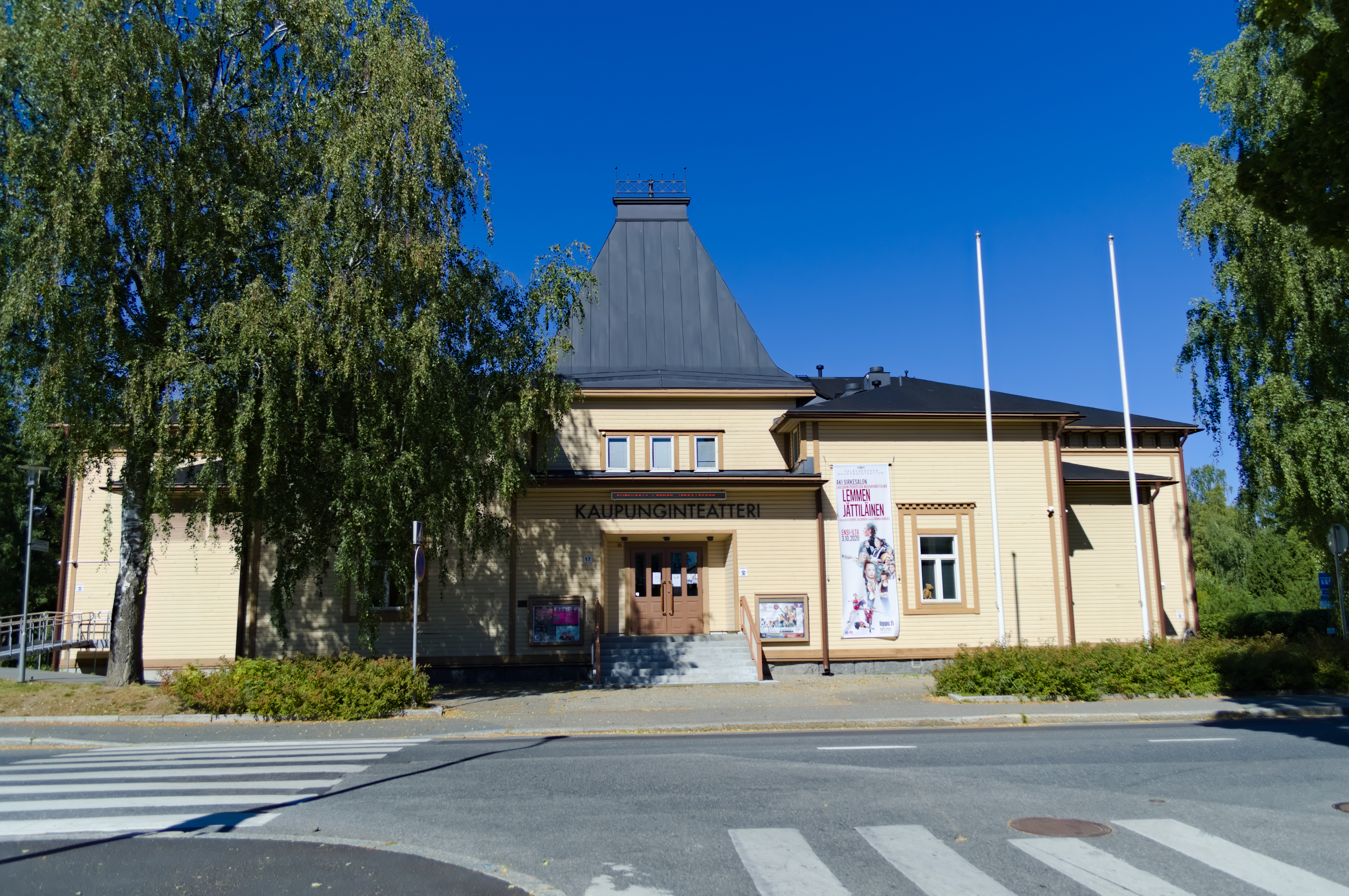 Valkeakosken kaupunginteatteri